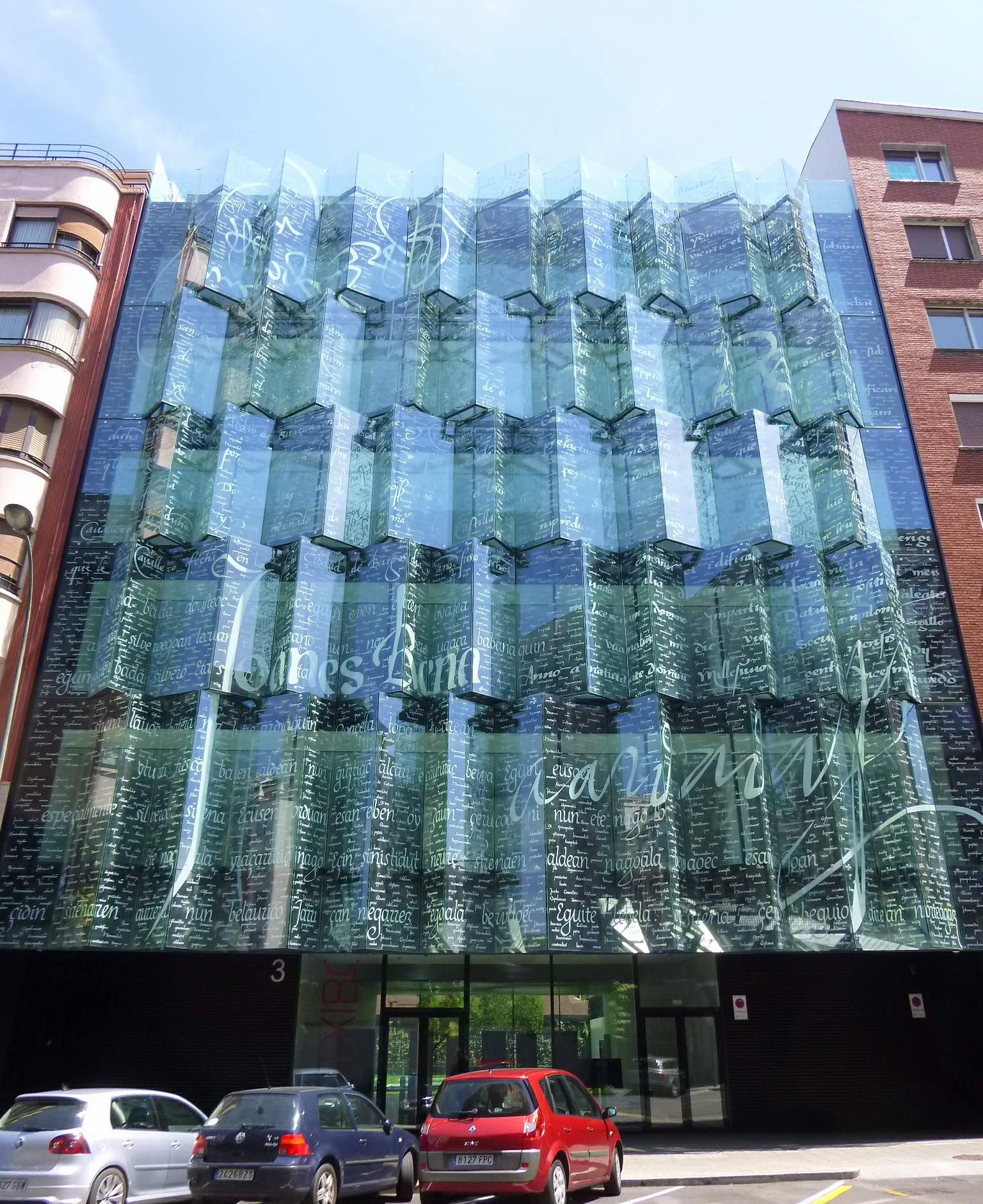 Archivo Histórico de Euskadi (Bilbao)